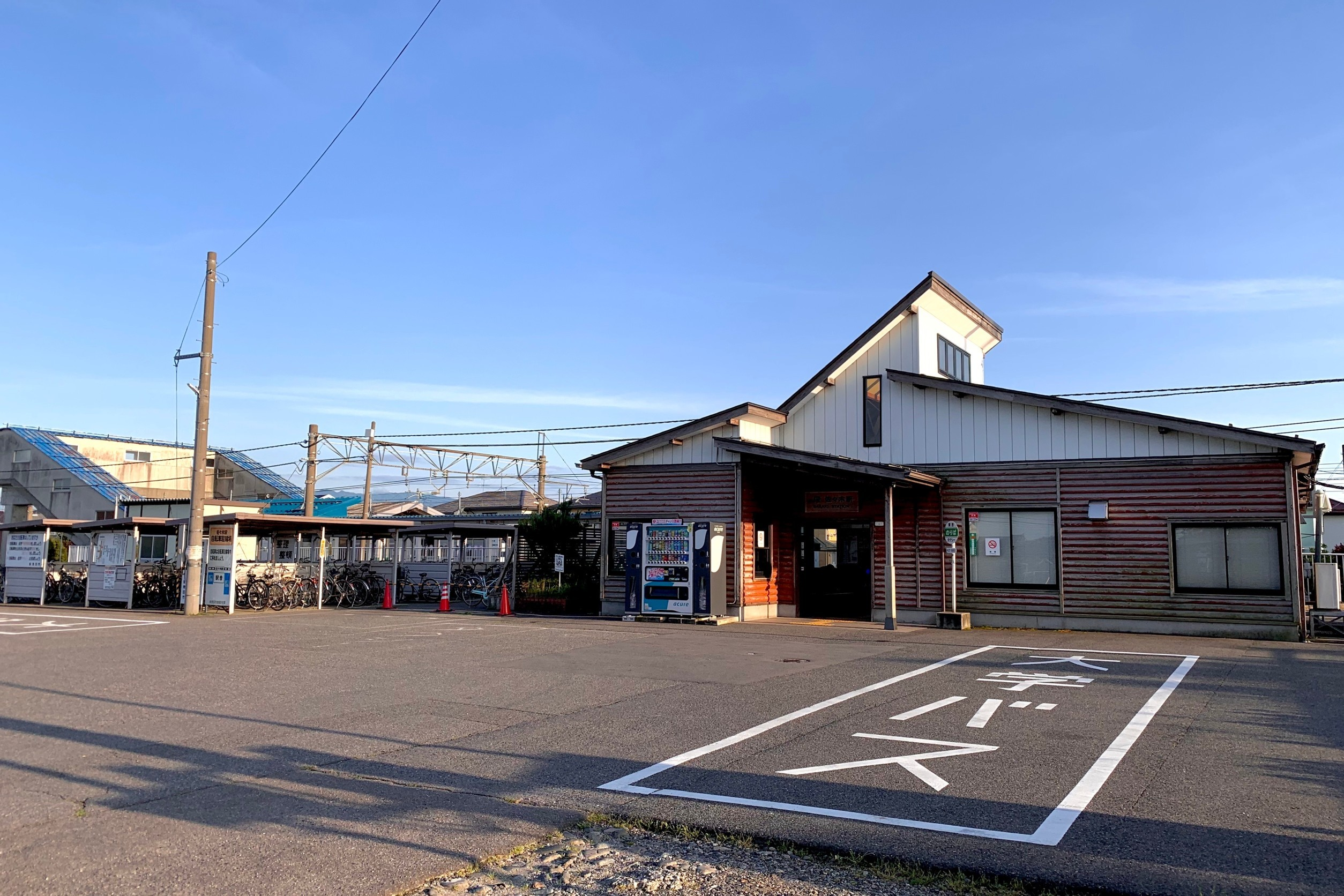 白新線佐々木駅の駅舎（2020年5月）